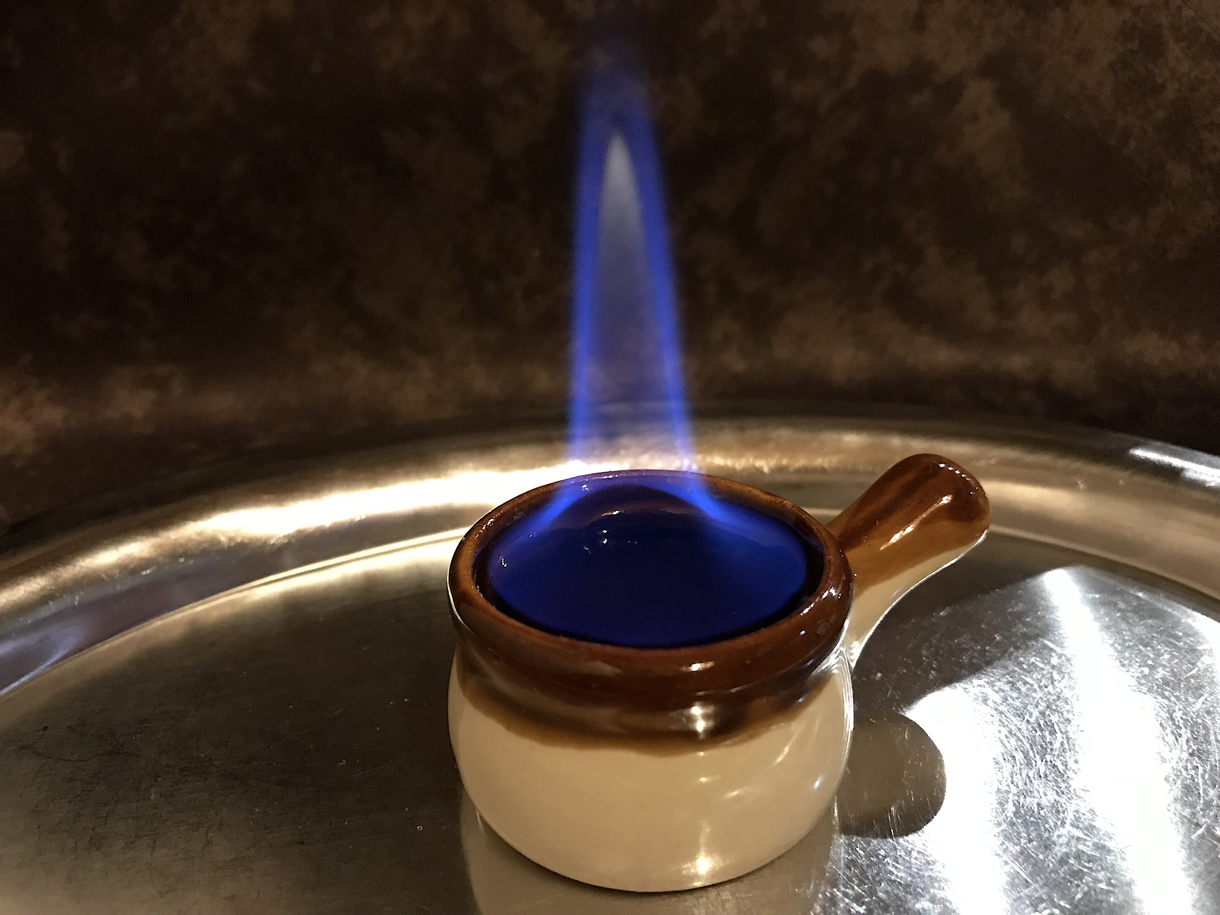 Hüttenfeuer aus Kräuterschnaps